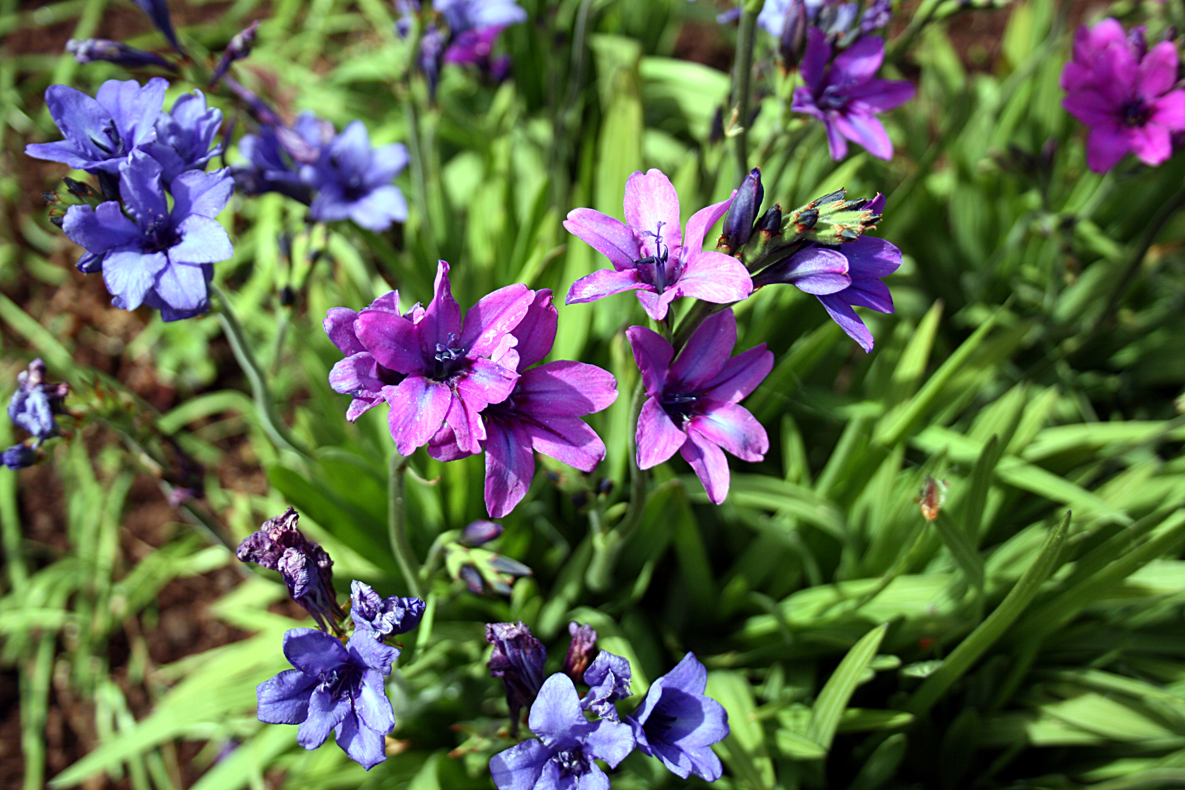 Madeira,_Palheiro_Gardens_-_Babiana_stricta